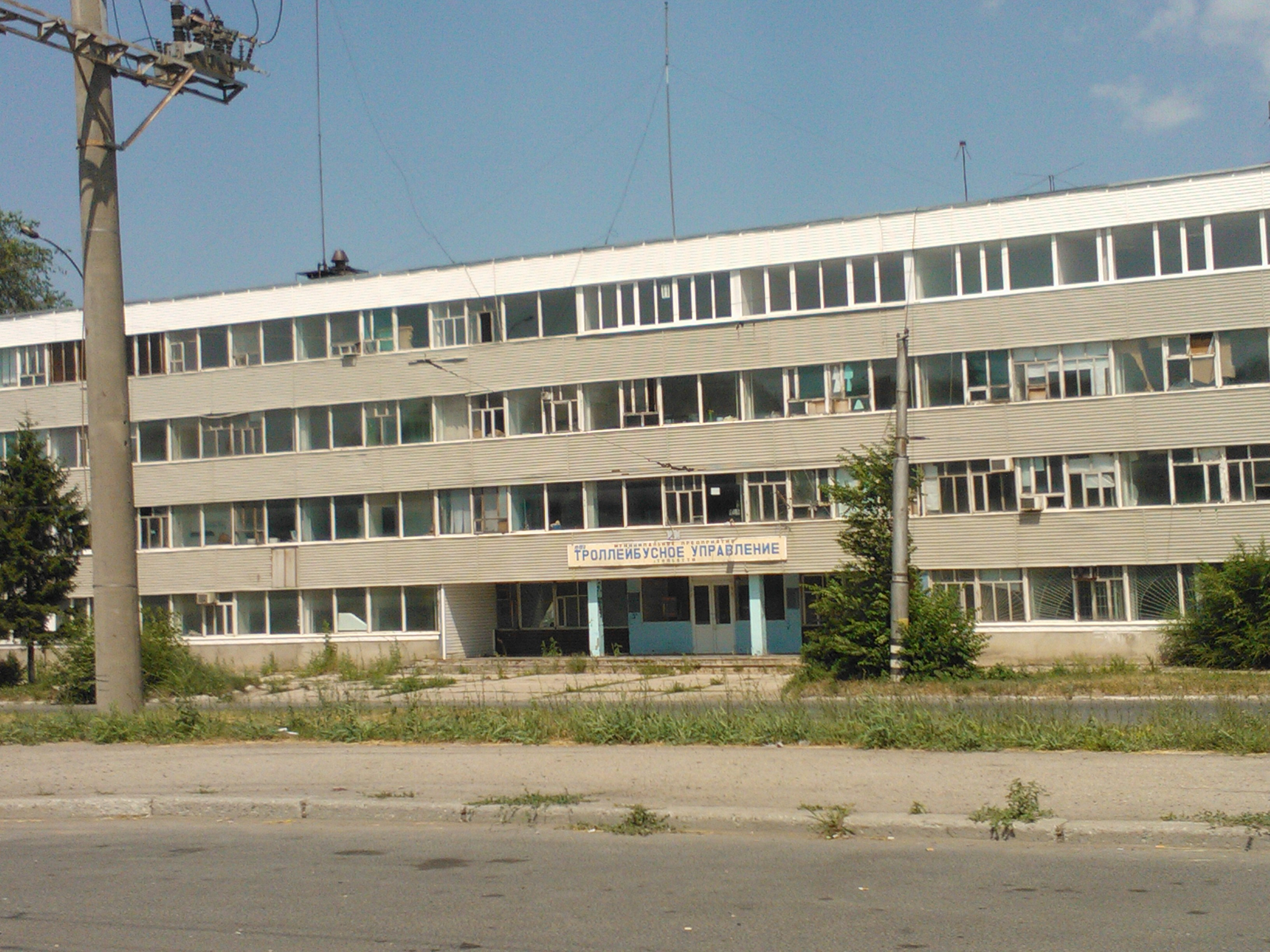 Здание бывшего депо №2.